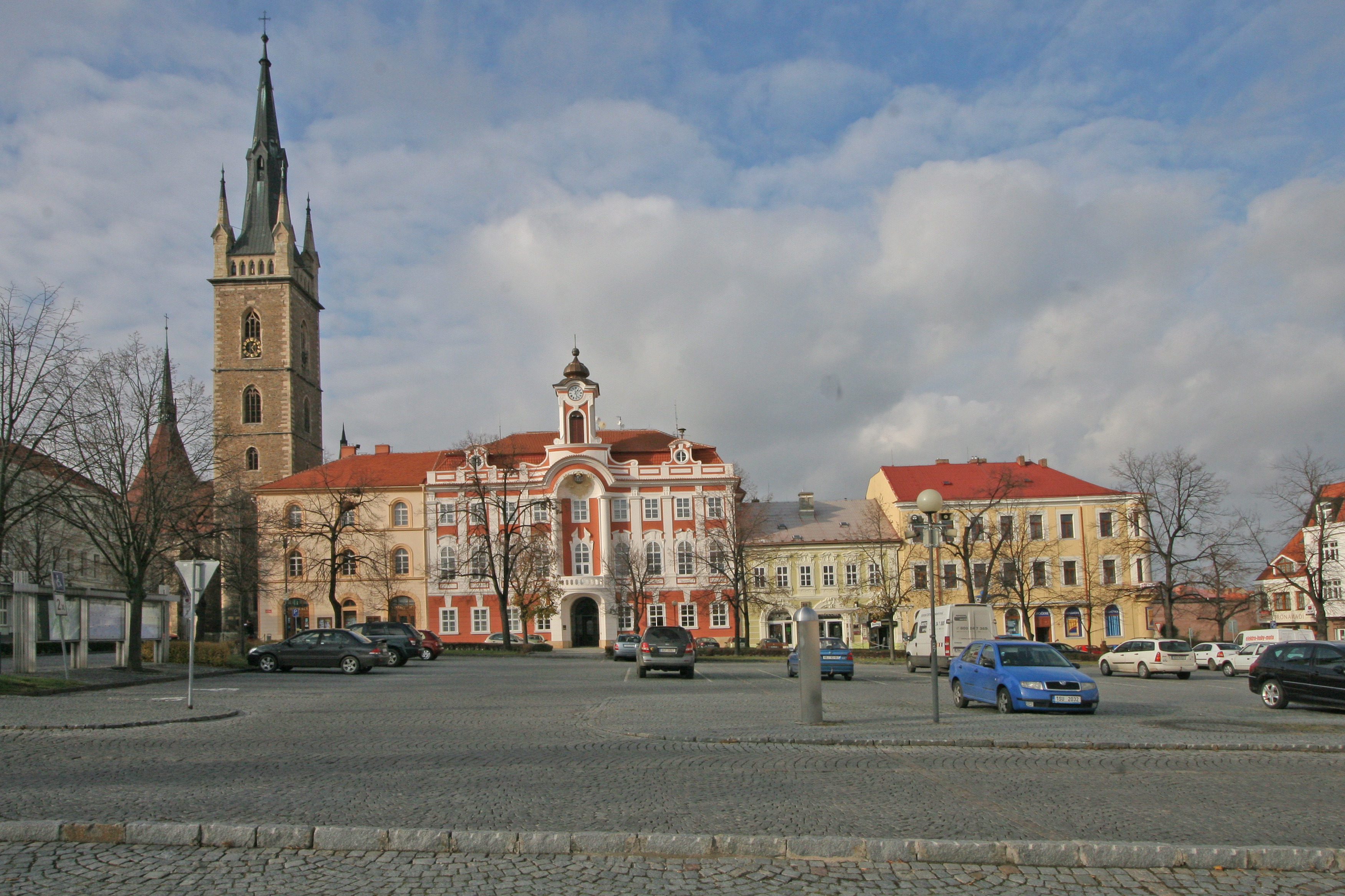 Čáslav - náměstí Jana Žižky z Trocnova - pohled k radnici